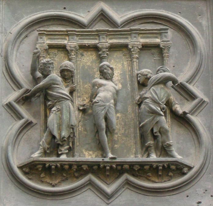 5 Flagellazione